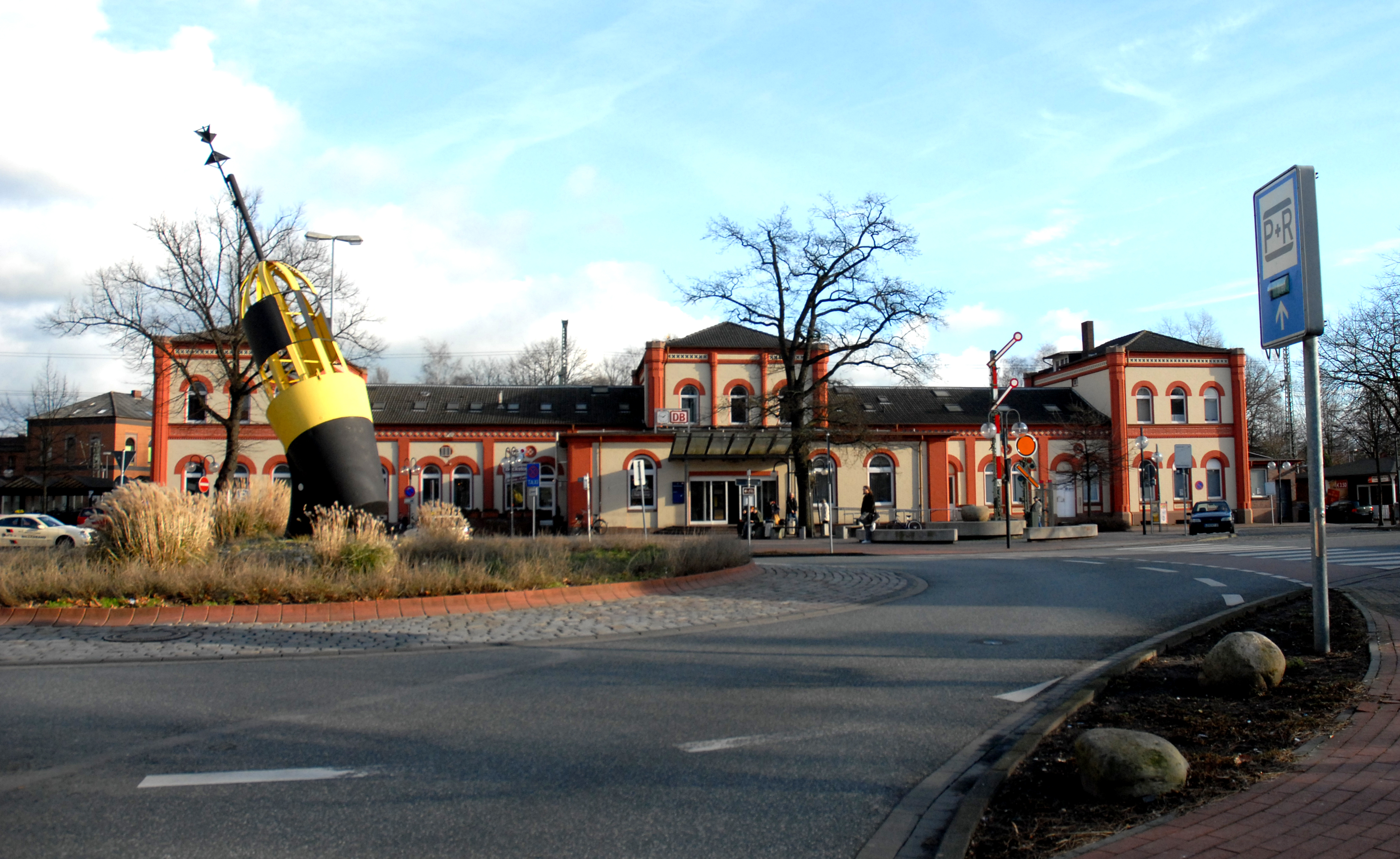 Voorplein van station Leer (Ostfriesland).